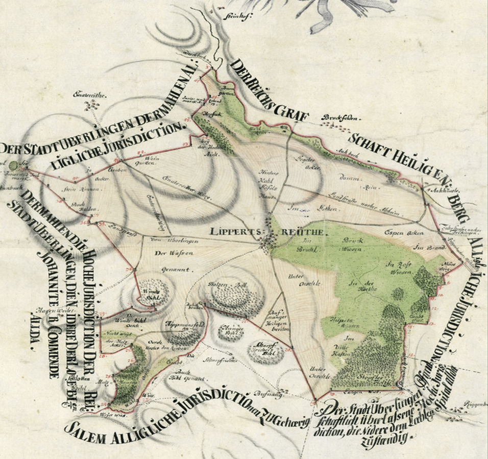 Deutschland (D) - Baden-Württemberg (BW) - Bodenseekreis (FN) - Überlingen - Lippertsreute: Karte von 1788